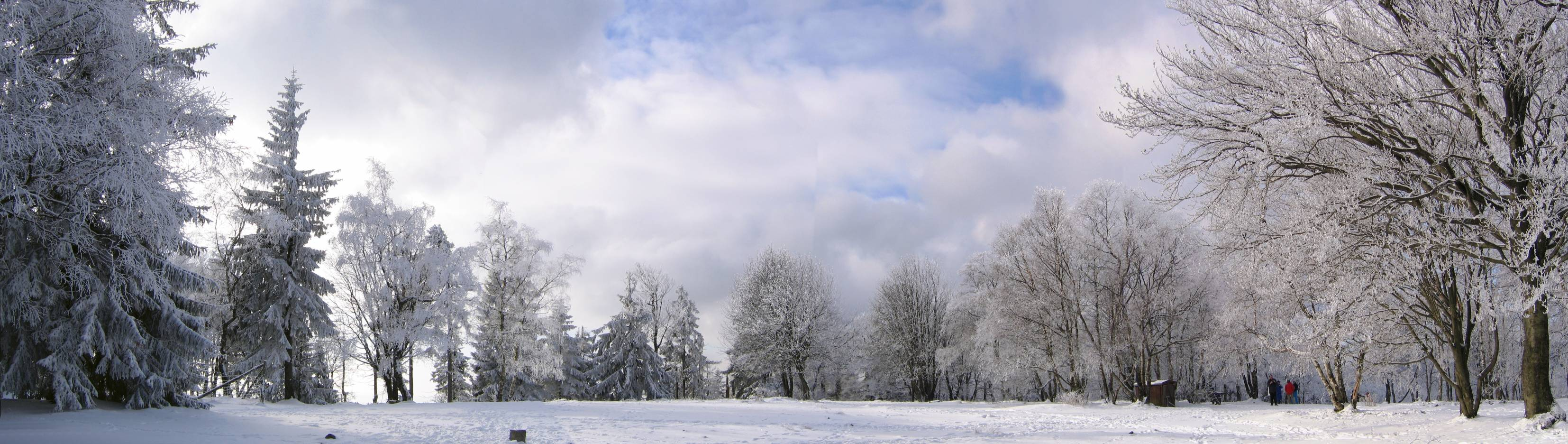 Winterliche Stimmung auf dem Altköniggipfelplateau (Panoramabild)